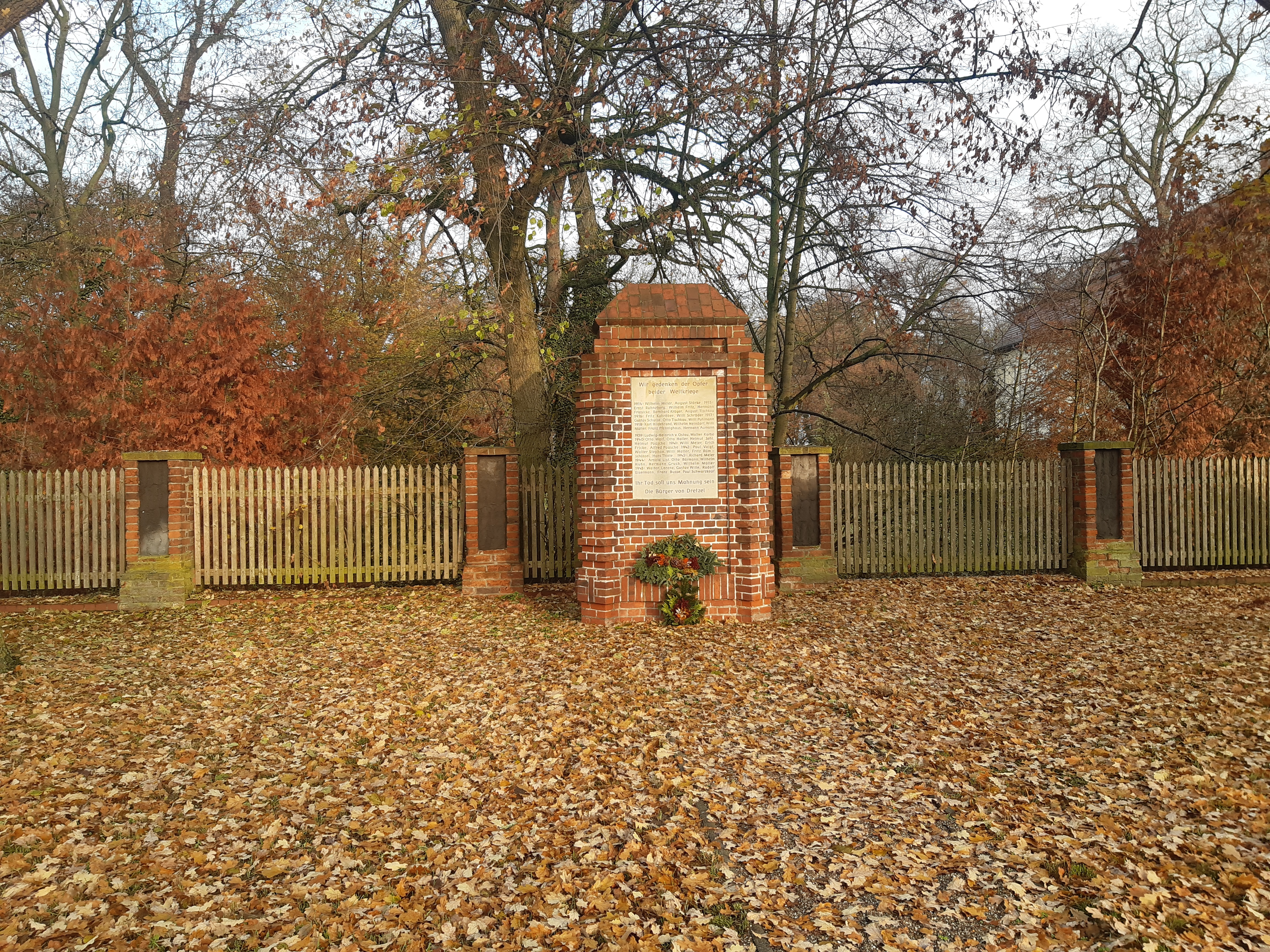 Kriegerdenkmal